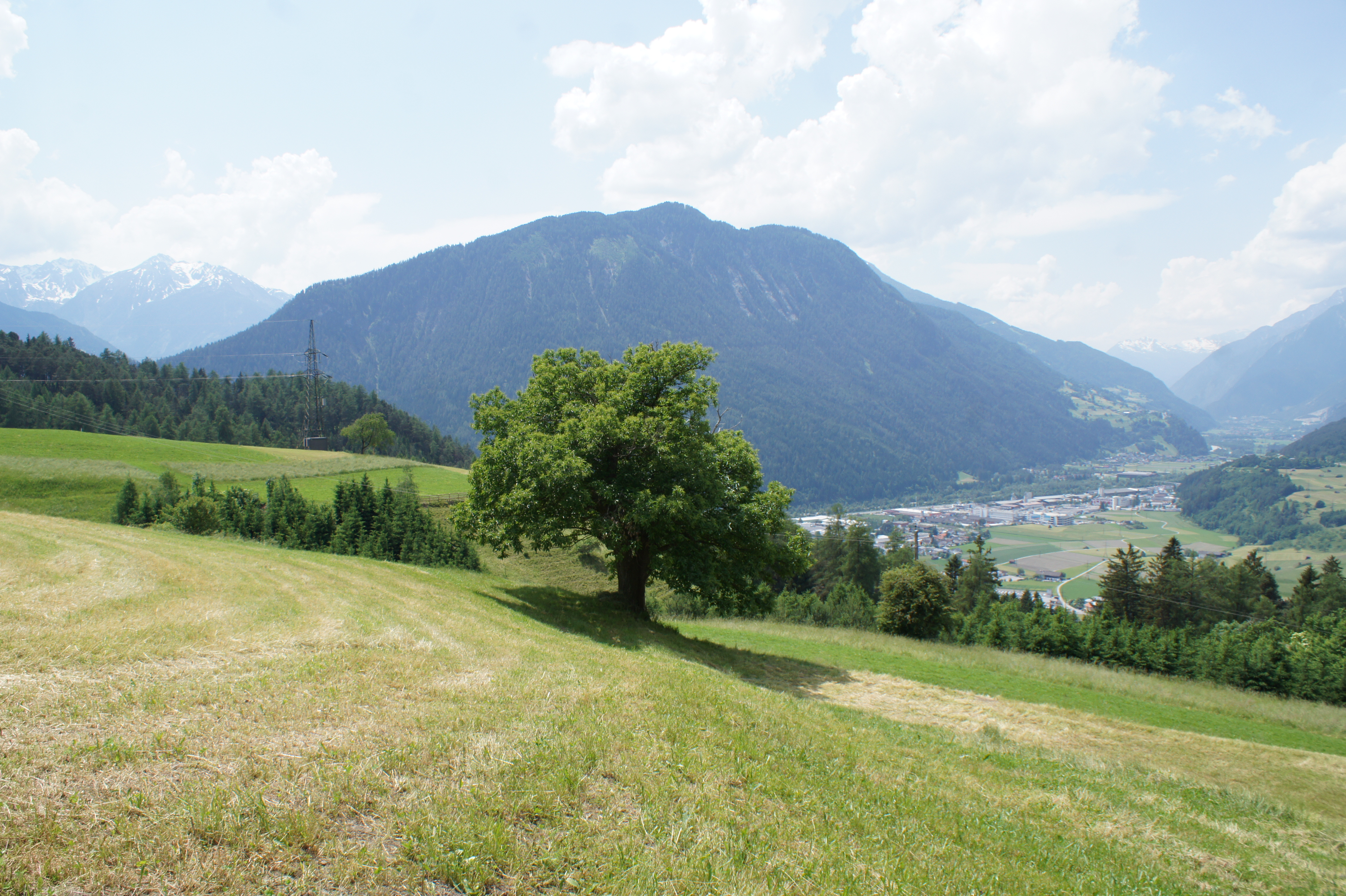 Edelkastanie nordwestlich von Karrösten This media shows the natural monument in the Tyrol with the ID ND_2_11.